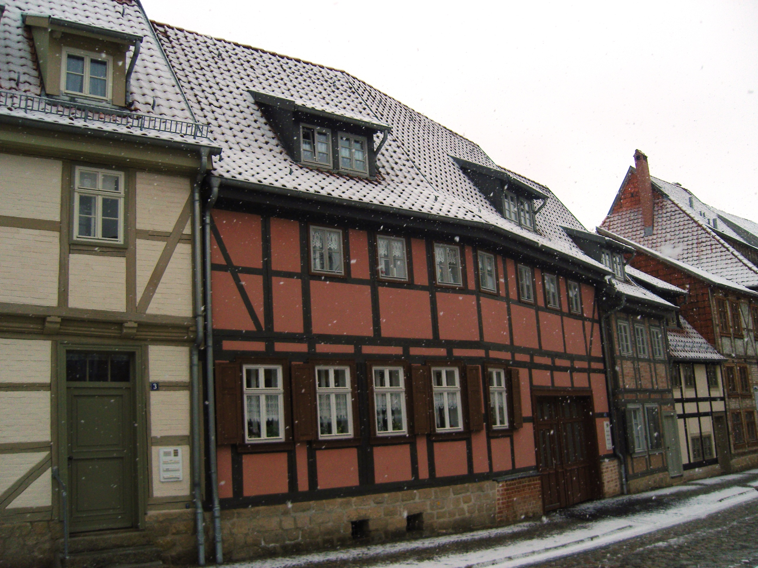 Denkmalgeschütztes Wohnhaus in der Straße Klink 4 in Quedlinburg